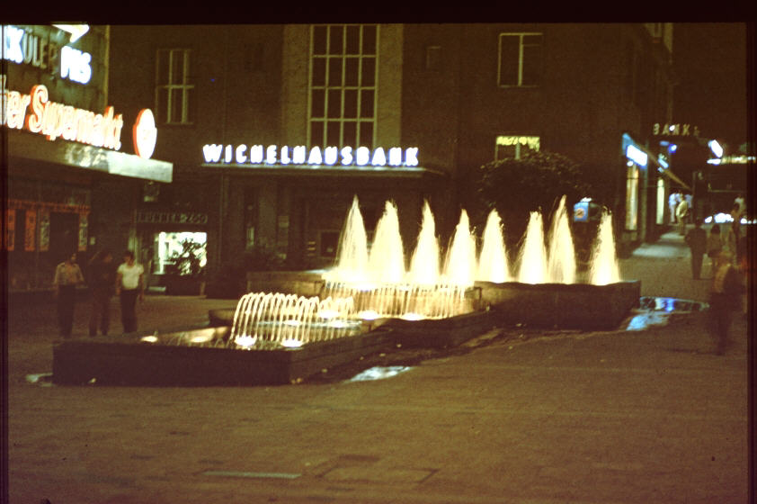 Wasserspiele (Brunnen) an der Alten Freiheit in Wuppertal Elberfeld Nachtaufnahme Gesamtansicht 1972